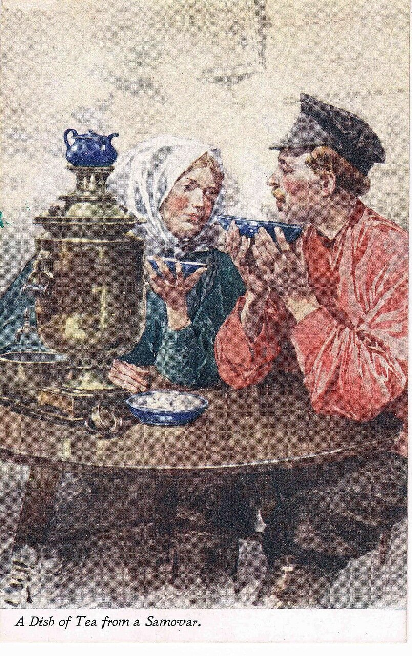 Чаепитие с самоваром. Открытка из серии «Русские типы»